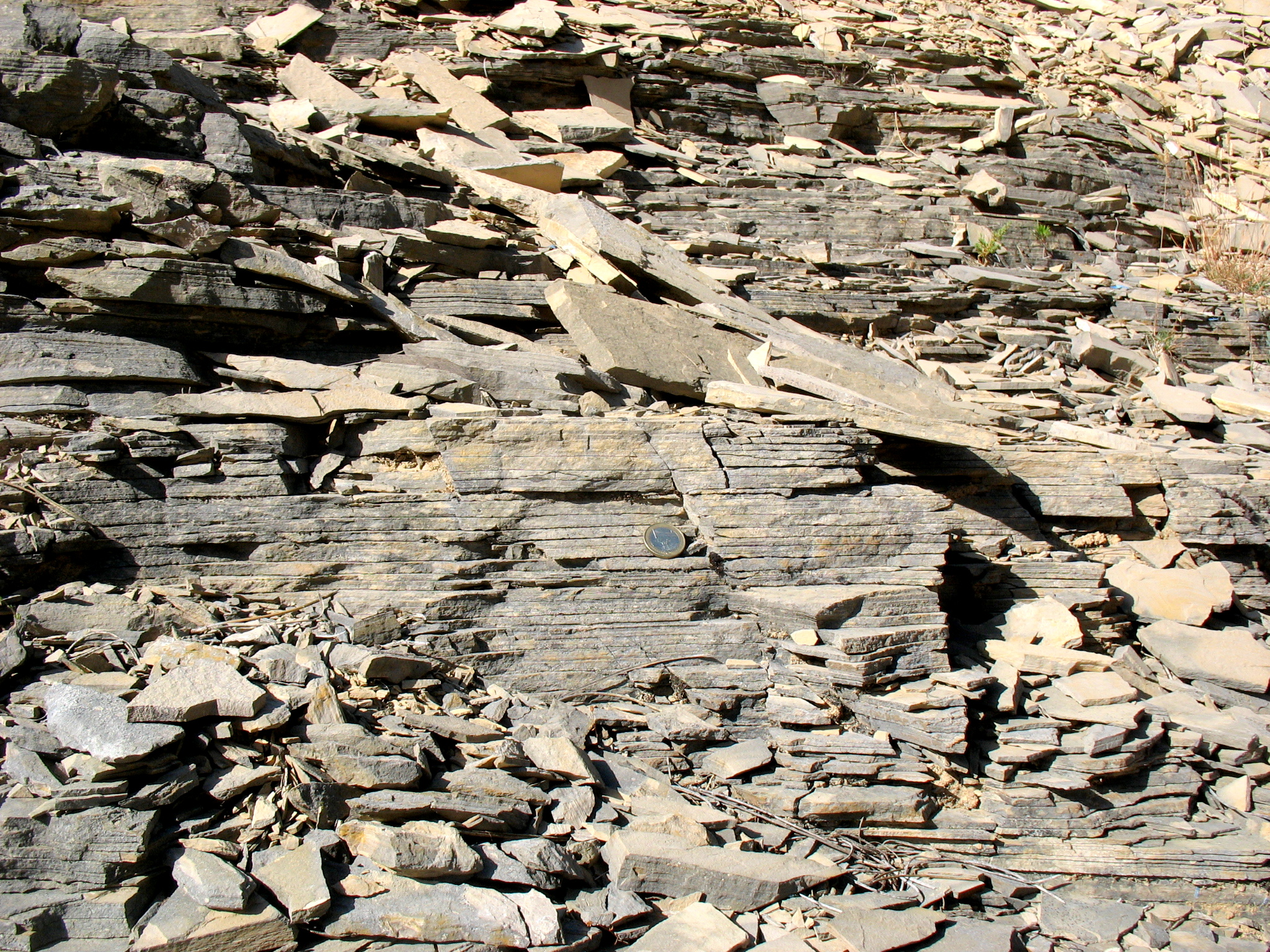 Yacimiento paleontológico de Las Hoyas. Campaña de 2018